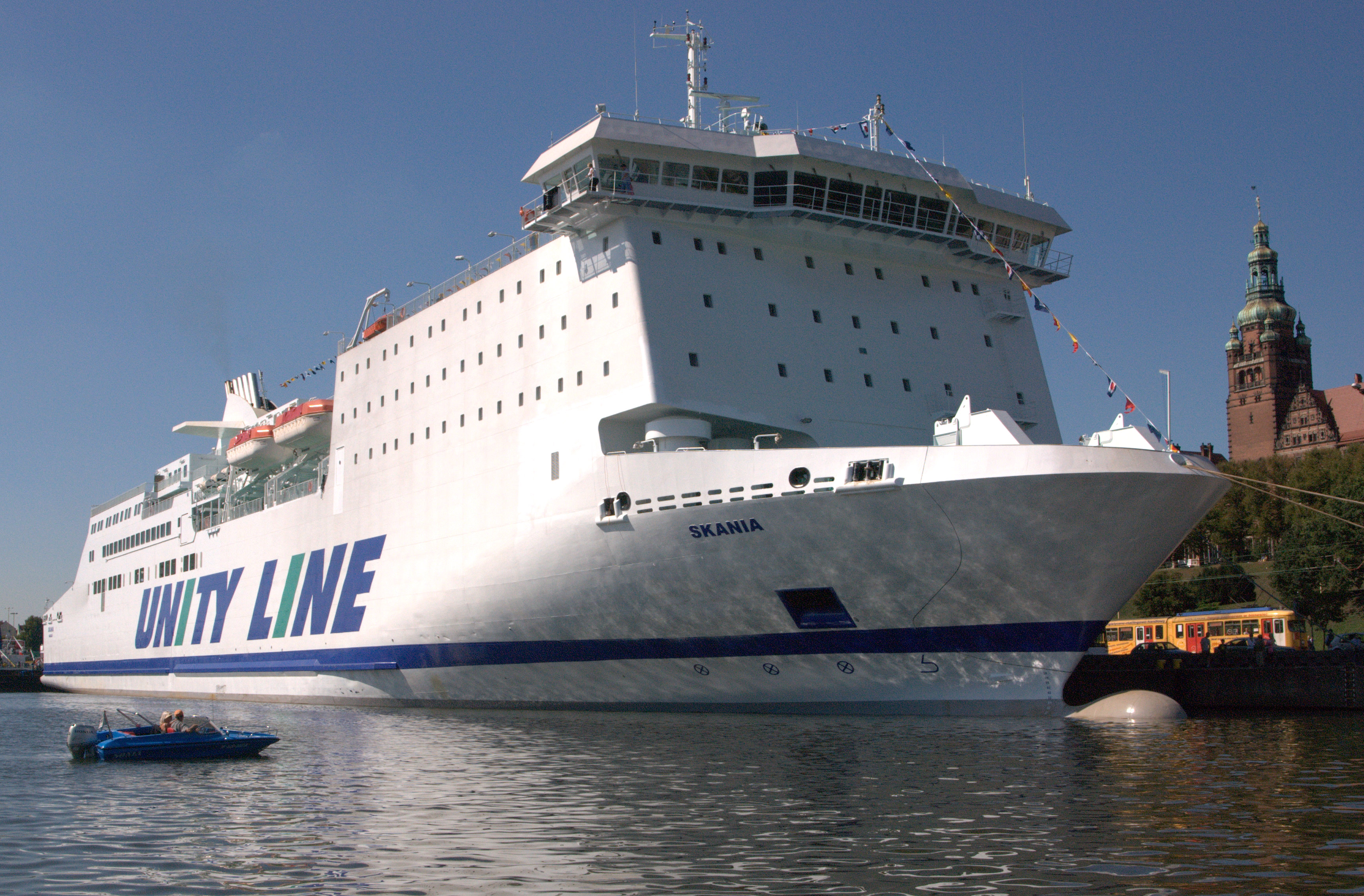 MF Skania